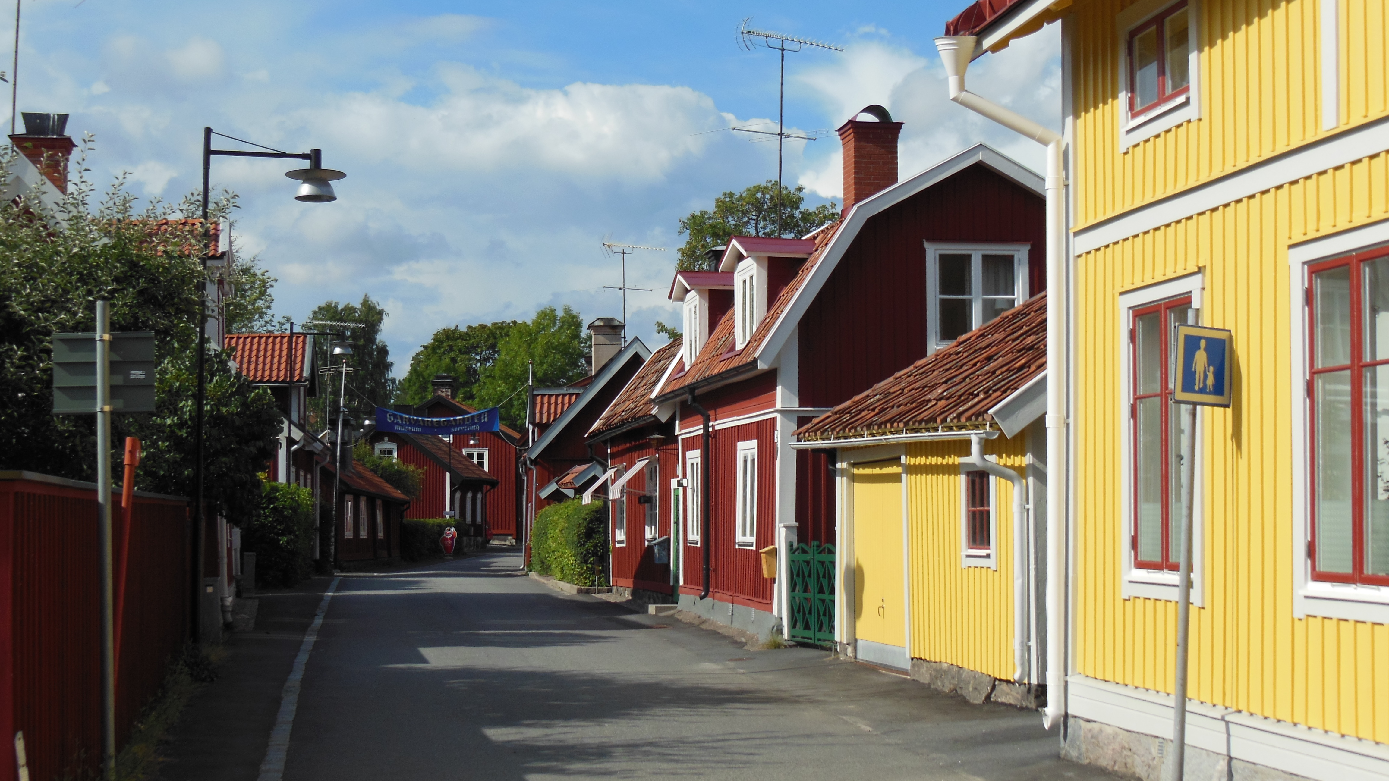 Trosas Altstadt mit vielen Holzhaüsern